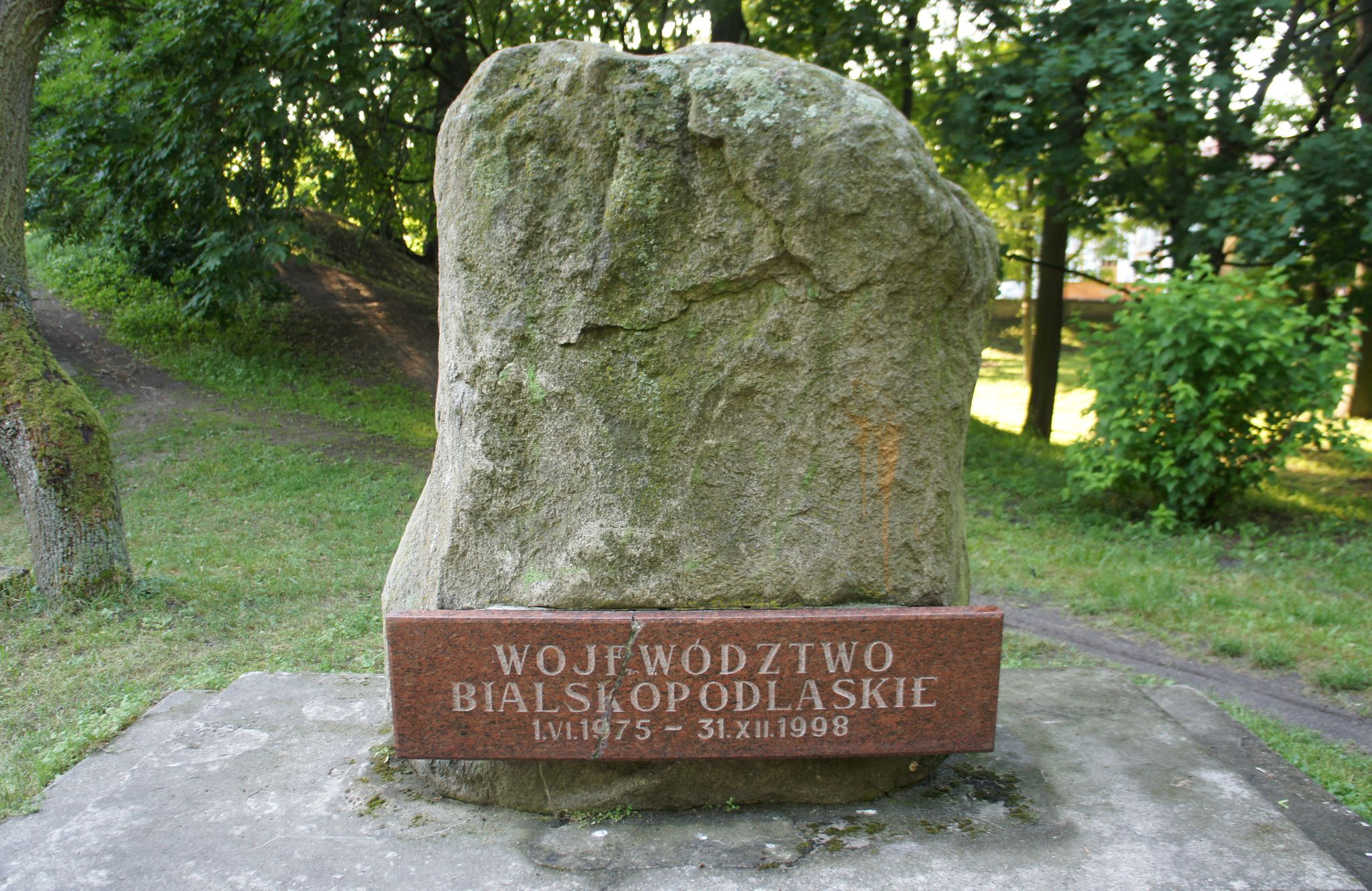 Pomnik w Białej Podlaskiej upamiętniający dawne województwo bialskopodlaskie.